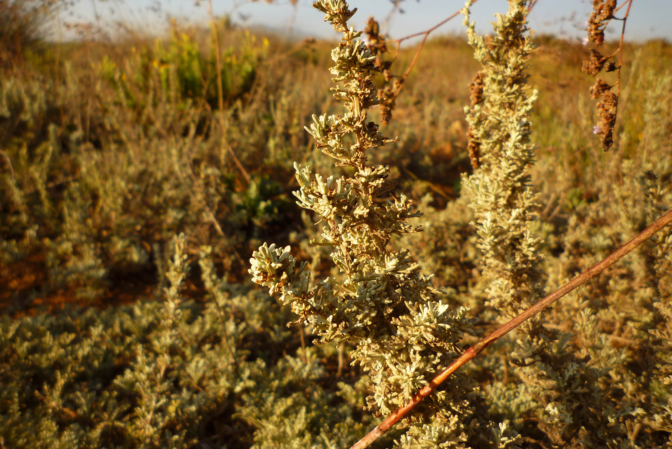 Tomillo blanco (Artemisia gallica [= Artemisia caerulescens ssp.gallica]) en El Vivero de La Manga del Mar Menor, Cartagena, España.